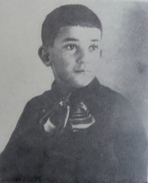 Zakaria Paliashvili's son, Irakli Paliashvili